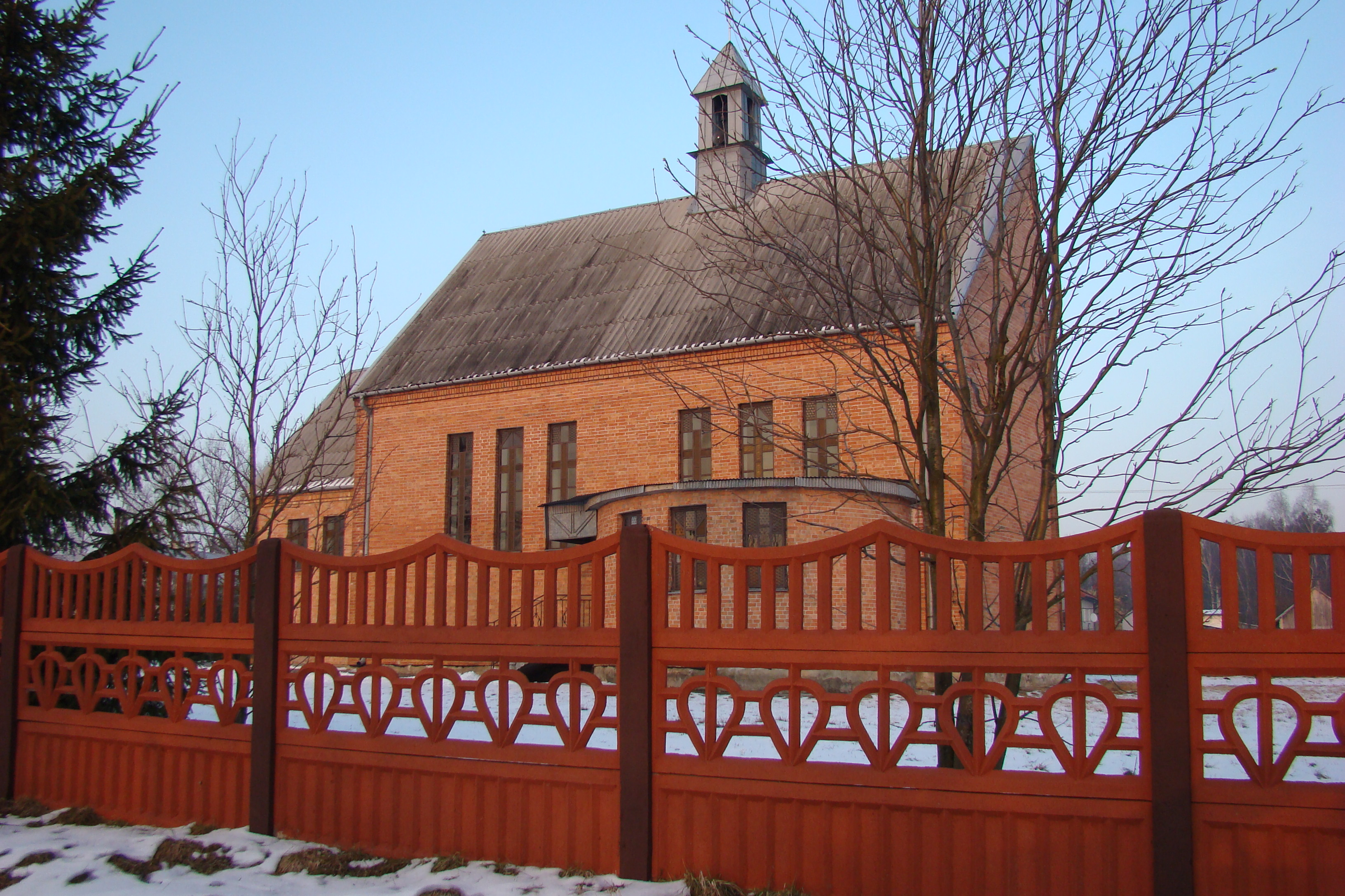 Szarbków church